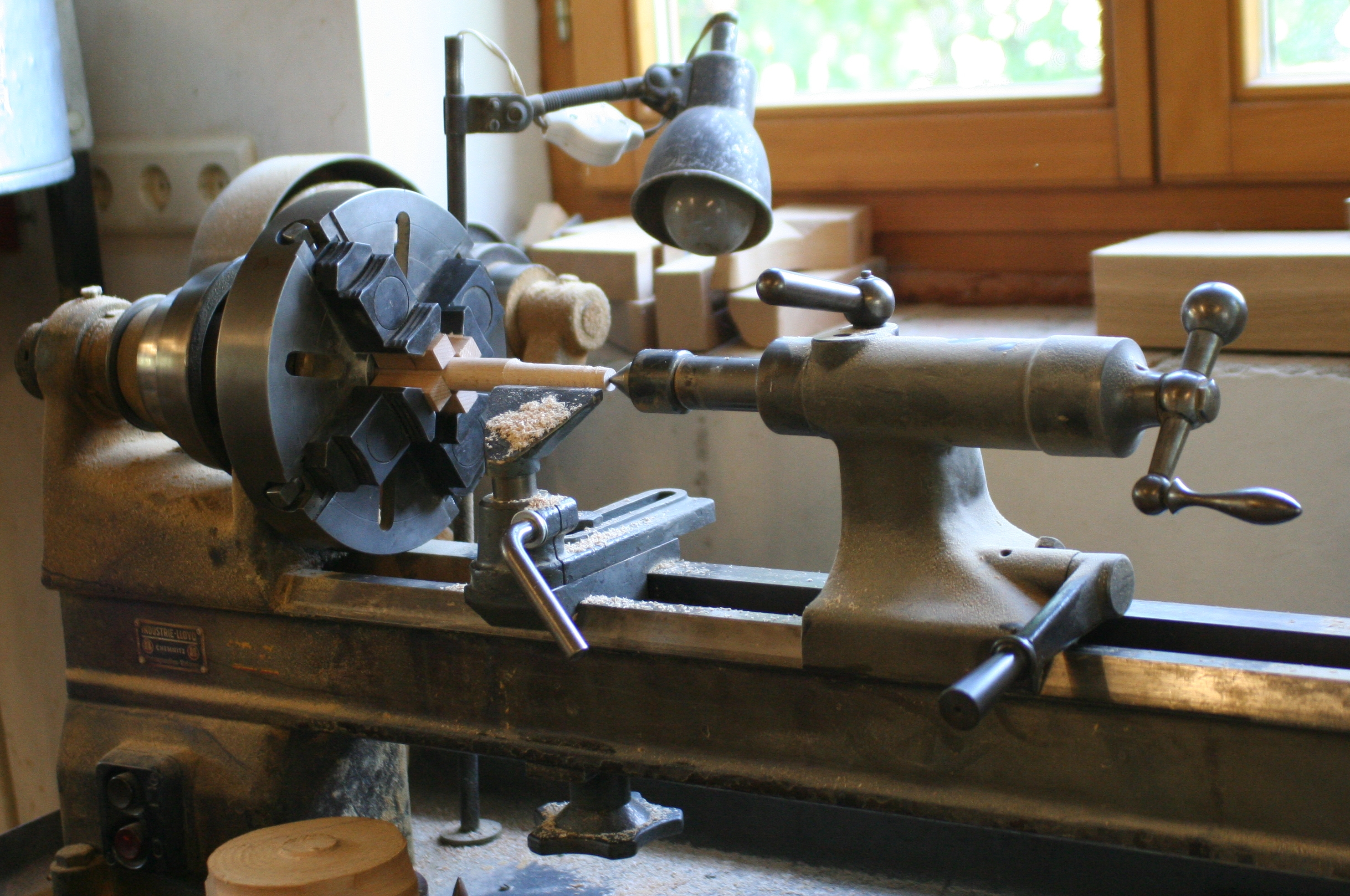 eine (holz)-drechsel.